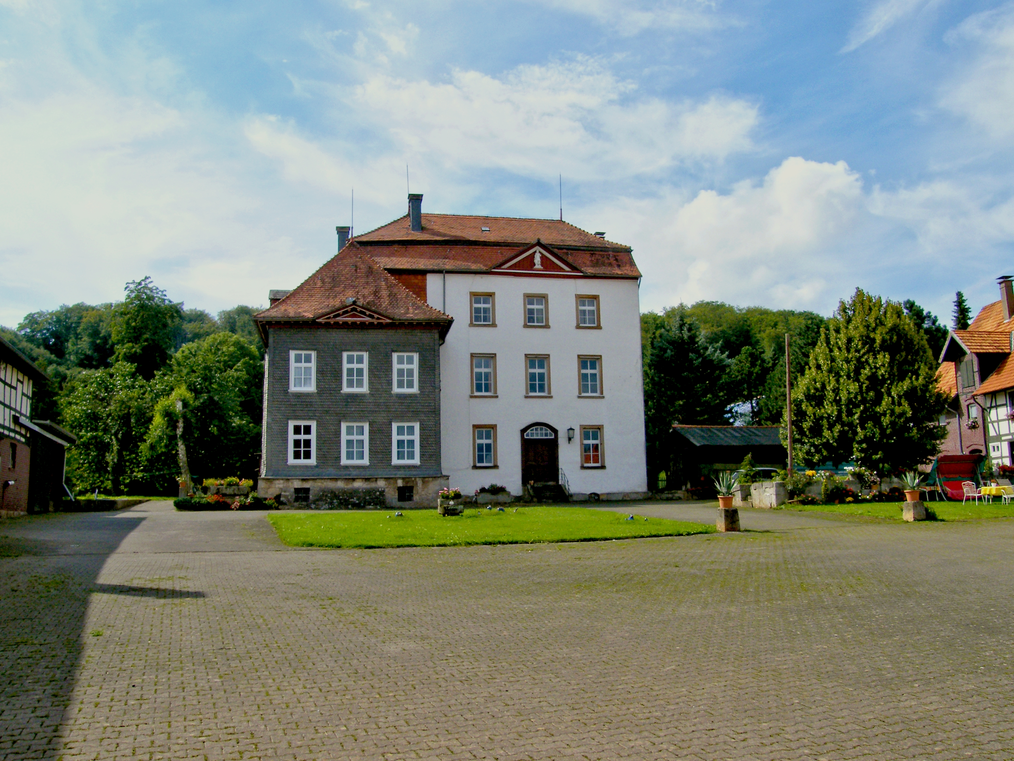 Ehemalige Wasserburg Wasserburg Lengefeld, (Herrenhaus) in Korbach-Lengefeld